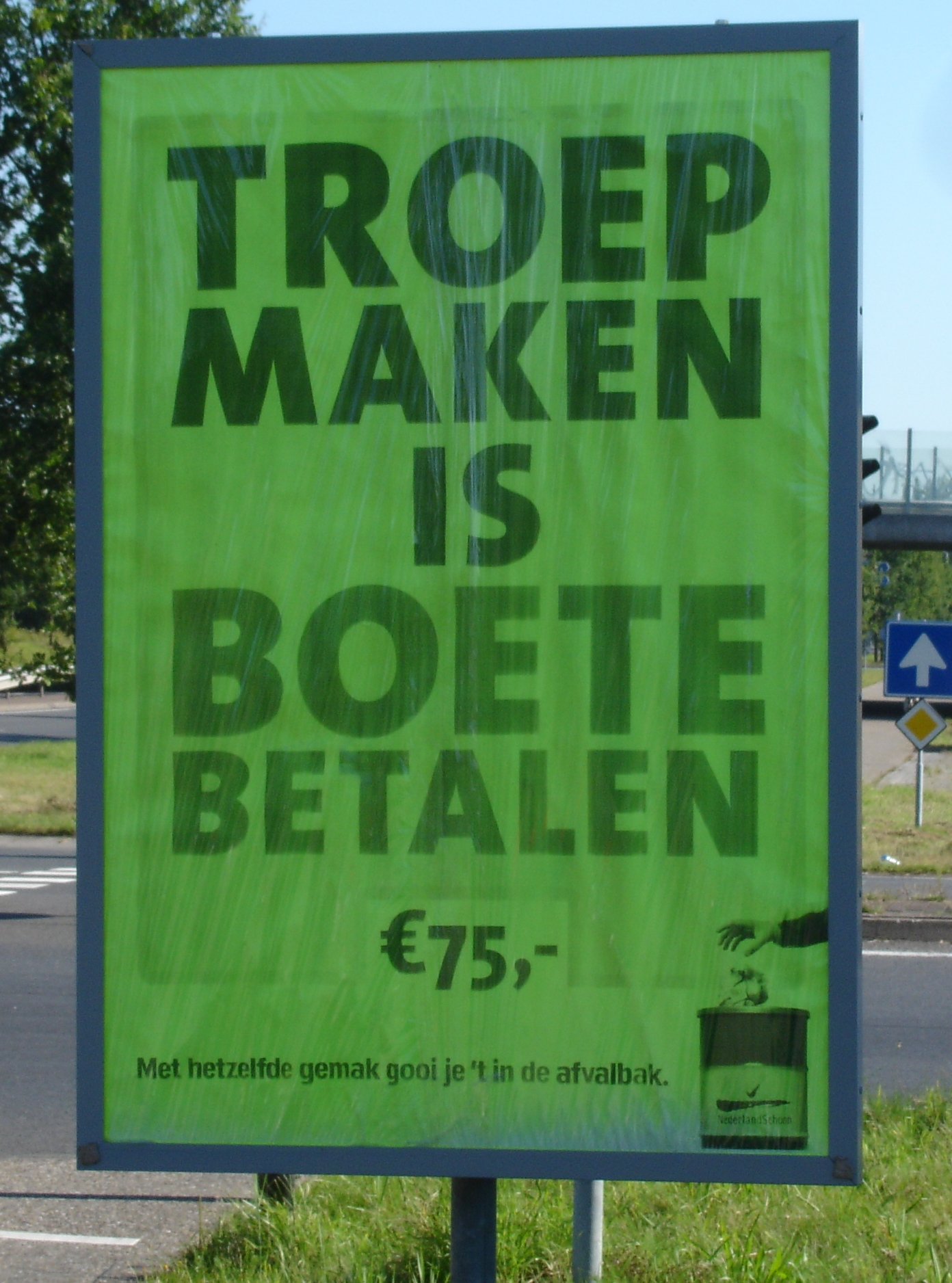 Bosvarken